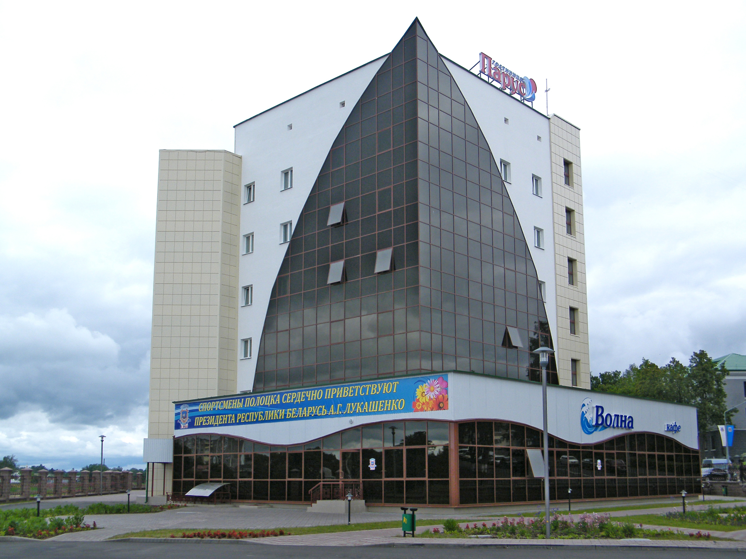 Центр гребли